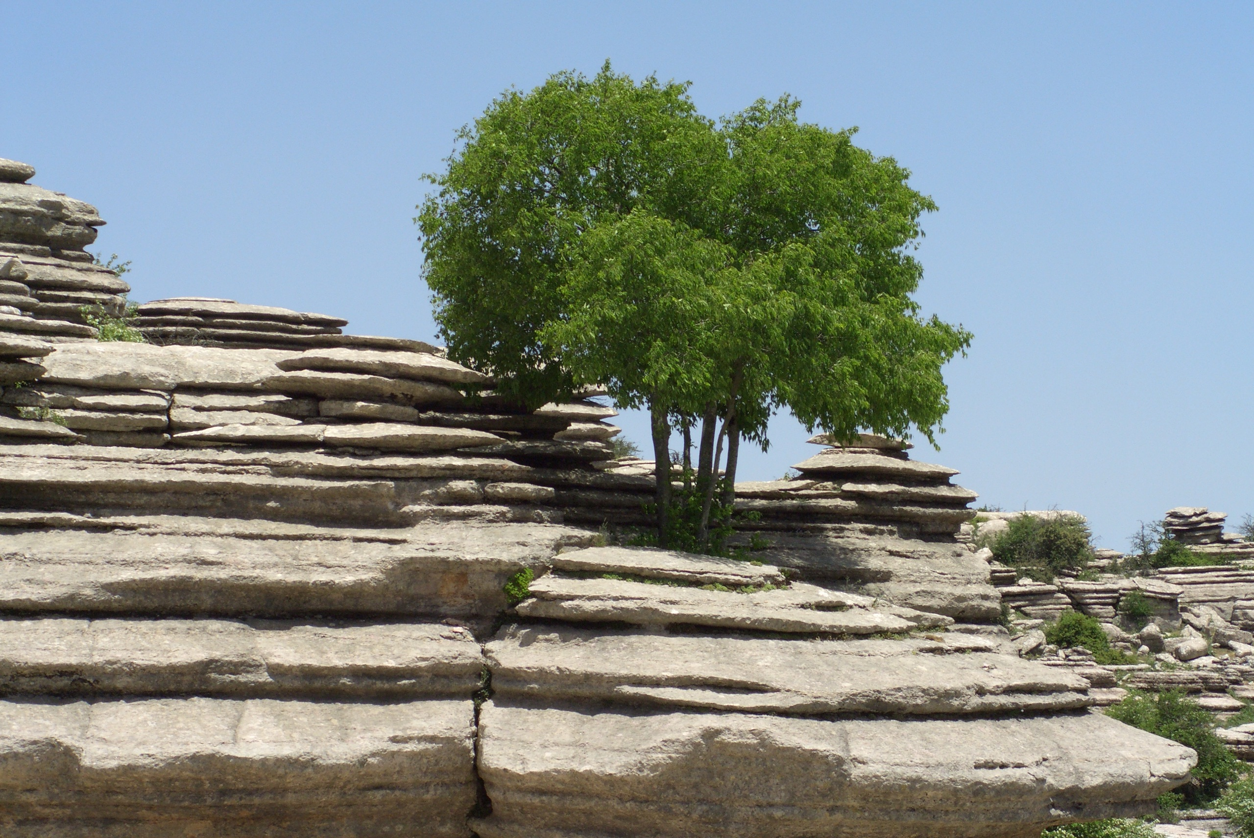 Steinformation in El Torcal, Spanien.